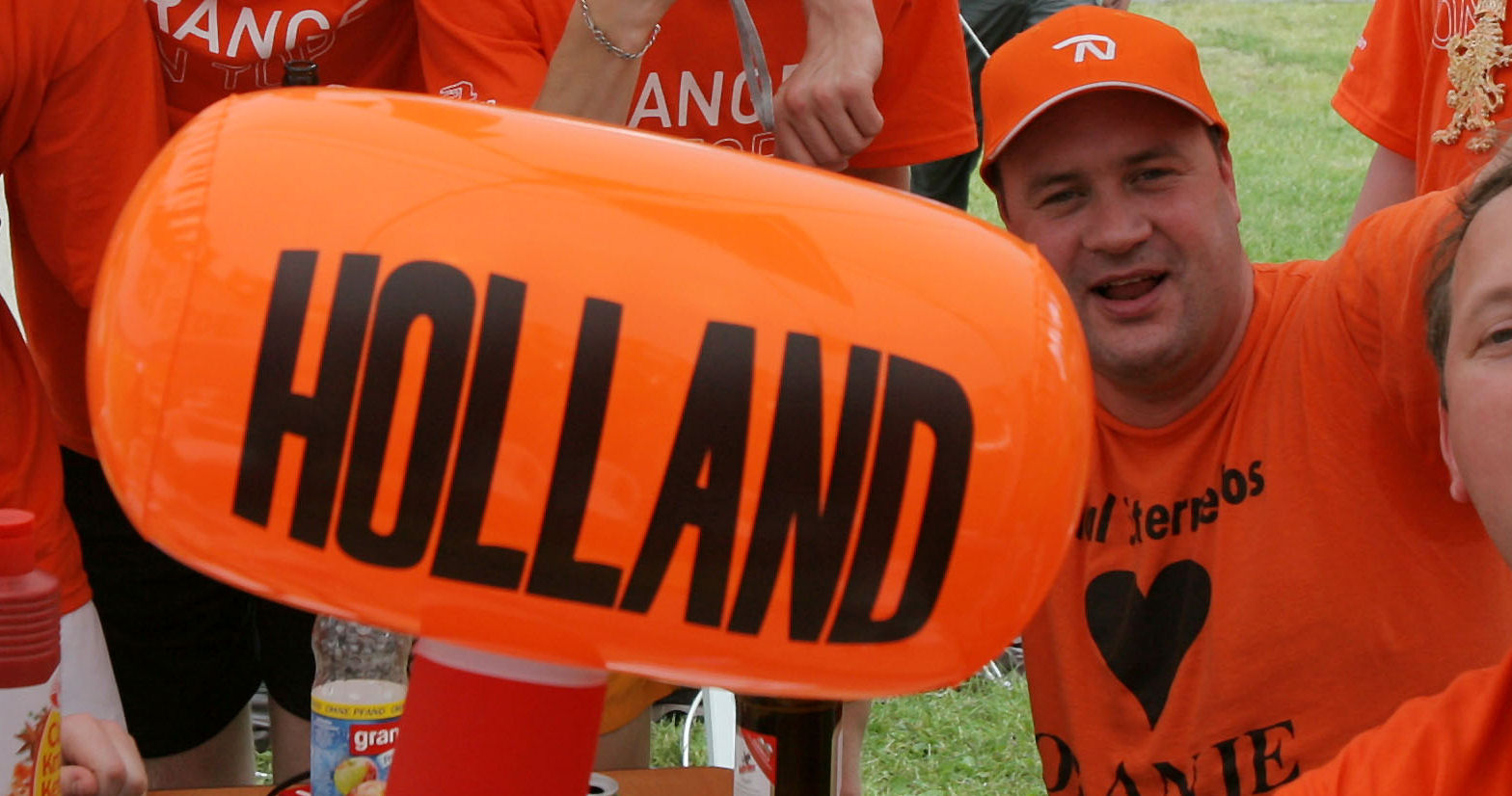 Hup Holland